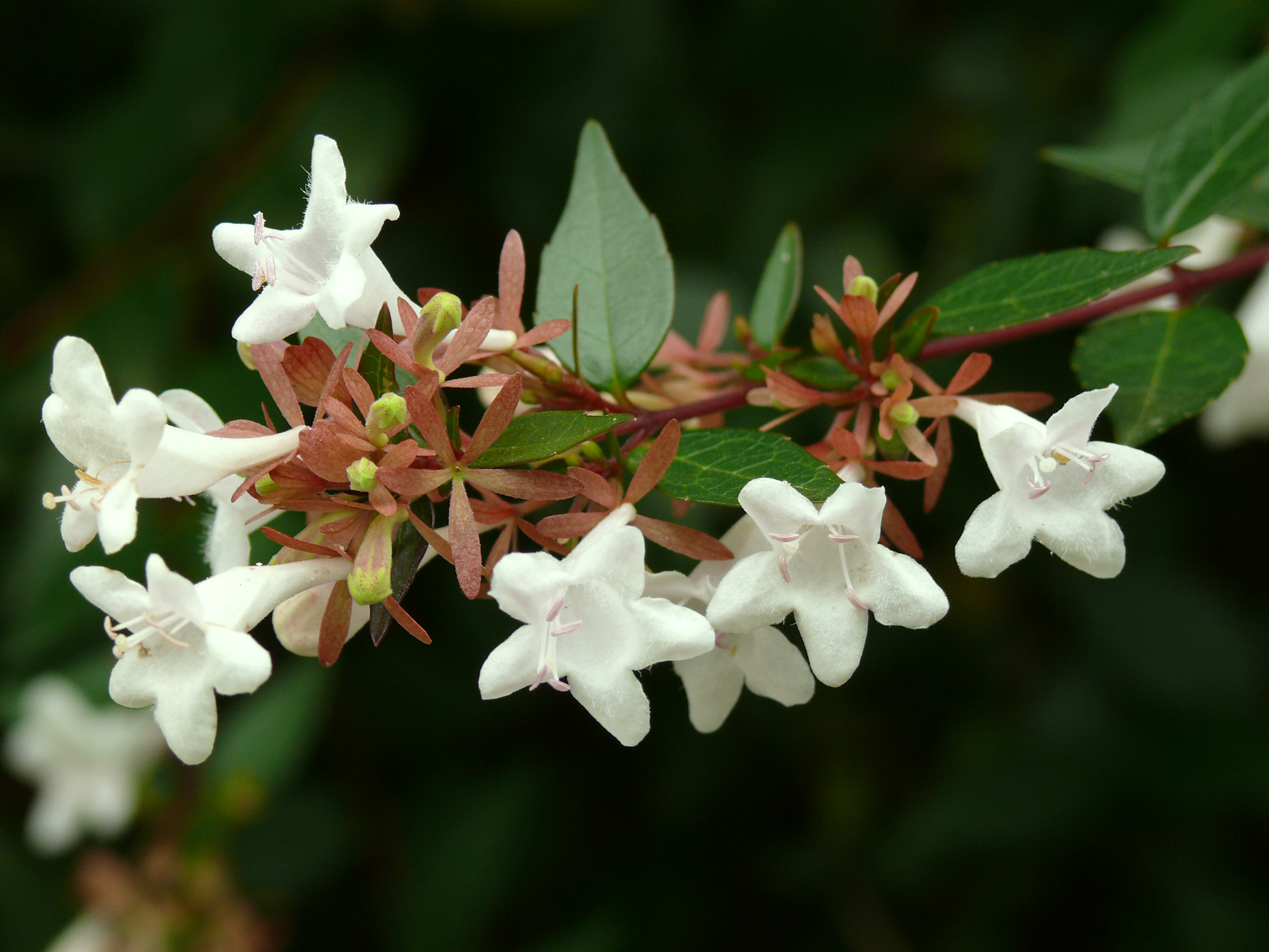 AbeliaTaken in Yokohama (Japan)